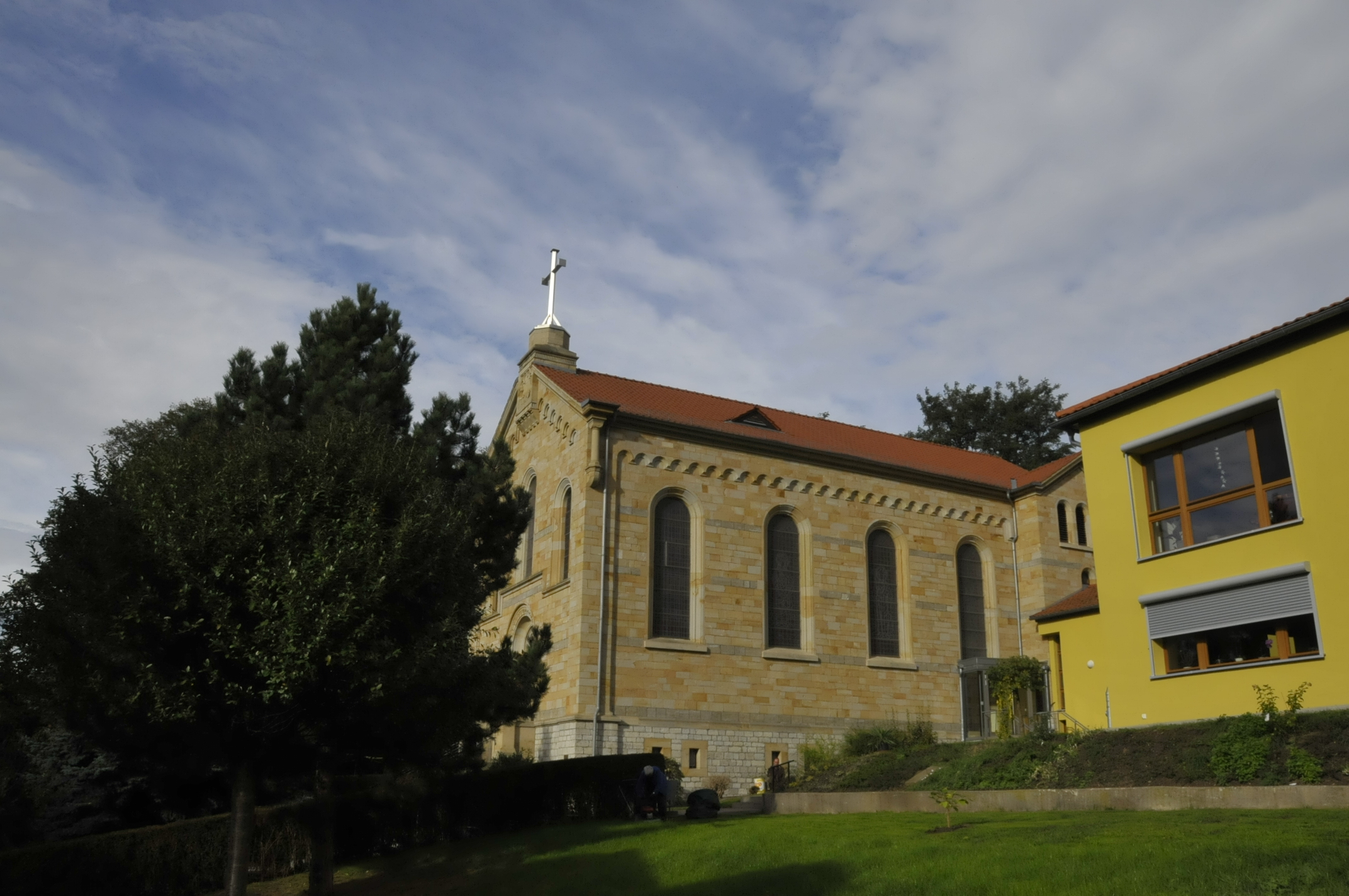 Gotha: St. Bonifatius-Kirche